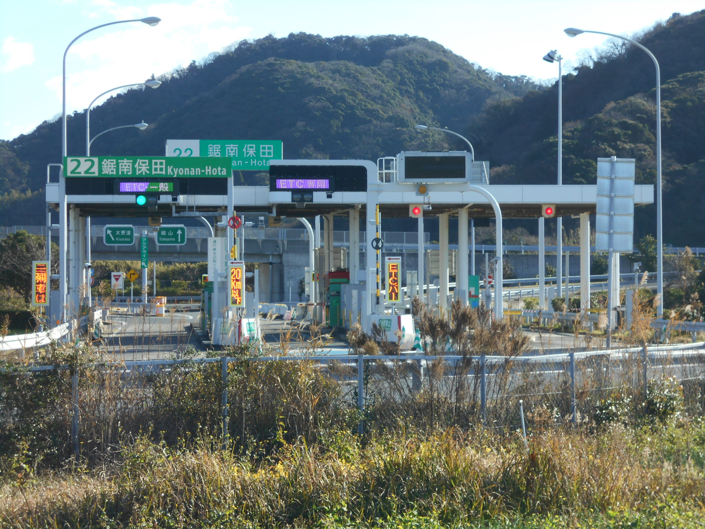 富津館山道路 鋸南保田インターチェンジ